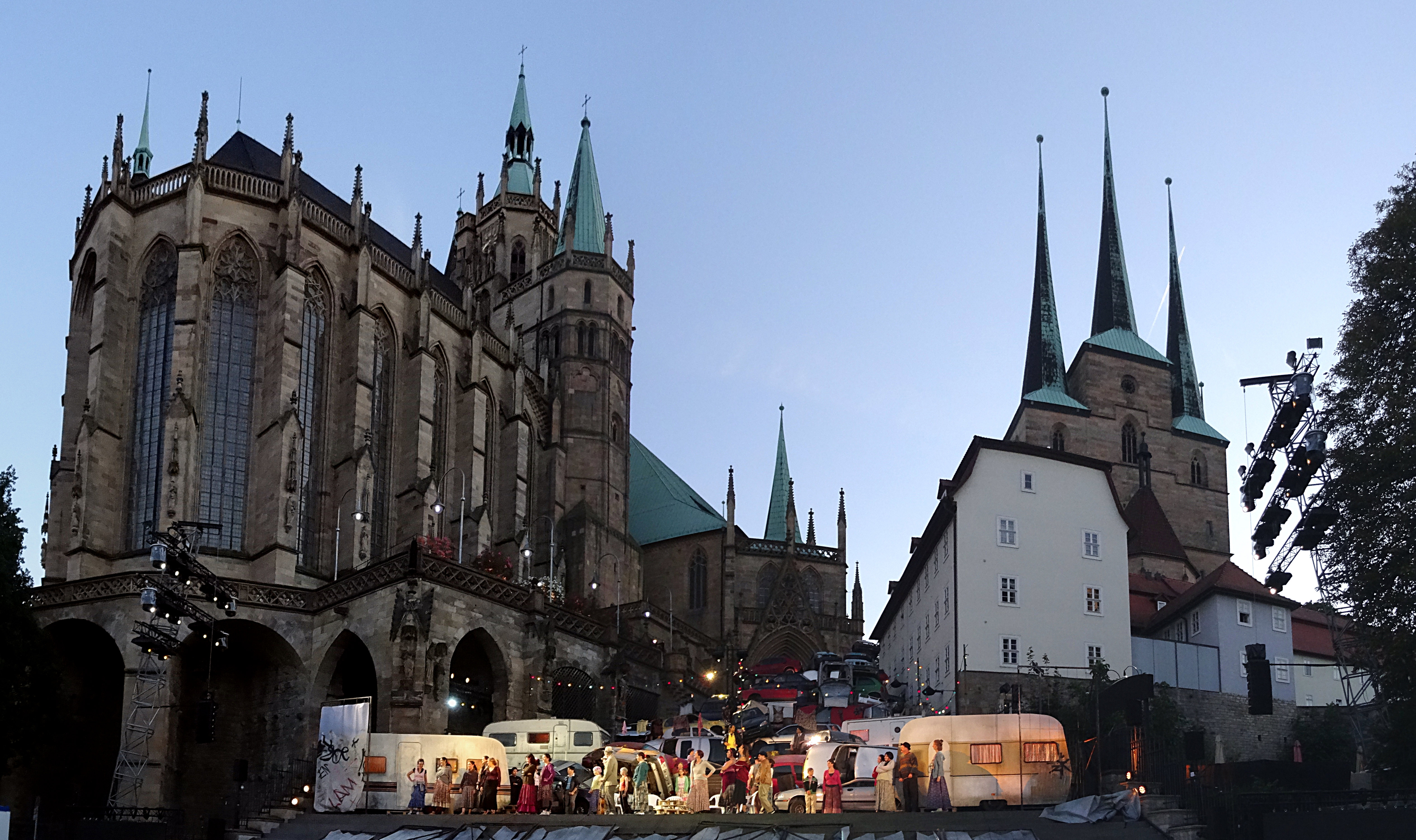 Provokantes Bühnenbild in der Carmen-Inszenierung von Guy Montavon bei den 25. Domstufen-Festspielen in Erfurt